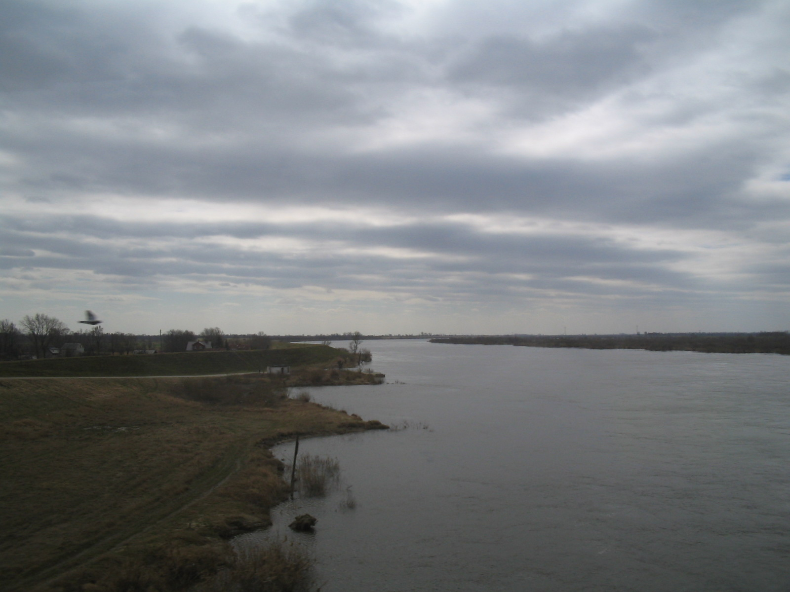 Wisla, gezien vanuit verkeersbrug doorgaande weg tussen Gdansk en Elbląg, april 2005